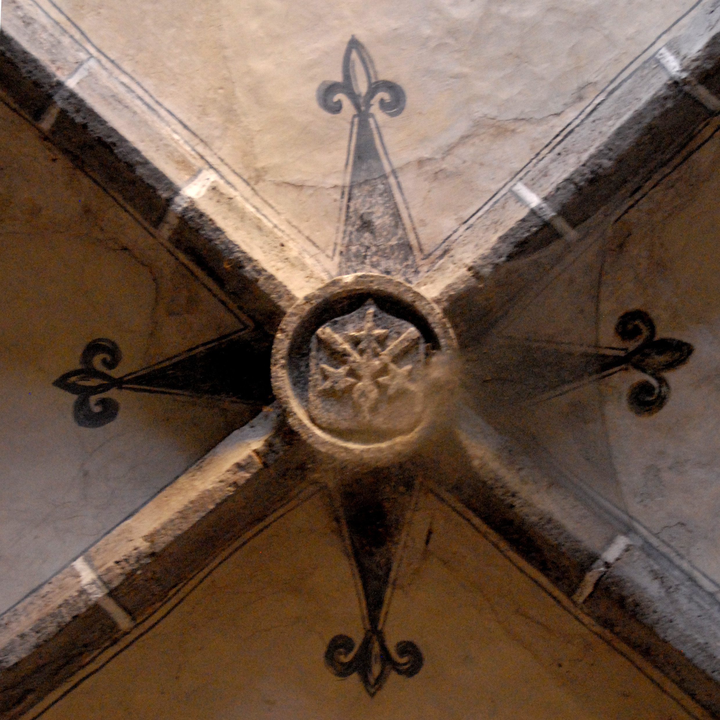 Abteikirche St.-André Lavaudieu, Schlussstein im Seitenschiff